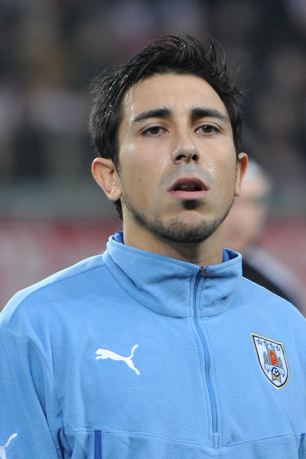 Freundschaftliches Länderspiel Österreich - Uruguay am 5. März 2014 in Klagenfurt: Jorge Fucile